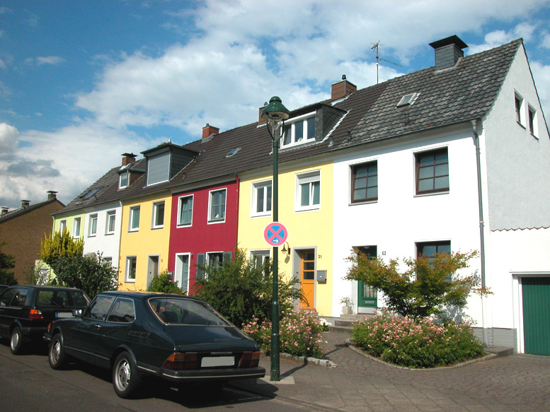 Die Straße "Ansbacher Straße" in Benrath, Düsseldorf